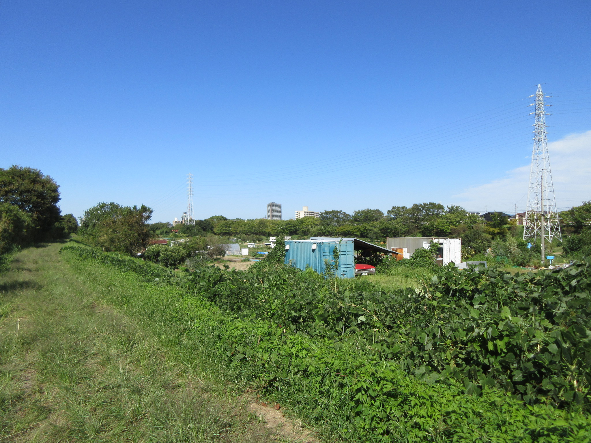 第1号六名緑地（岡崎市六名町）